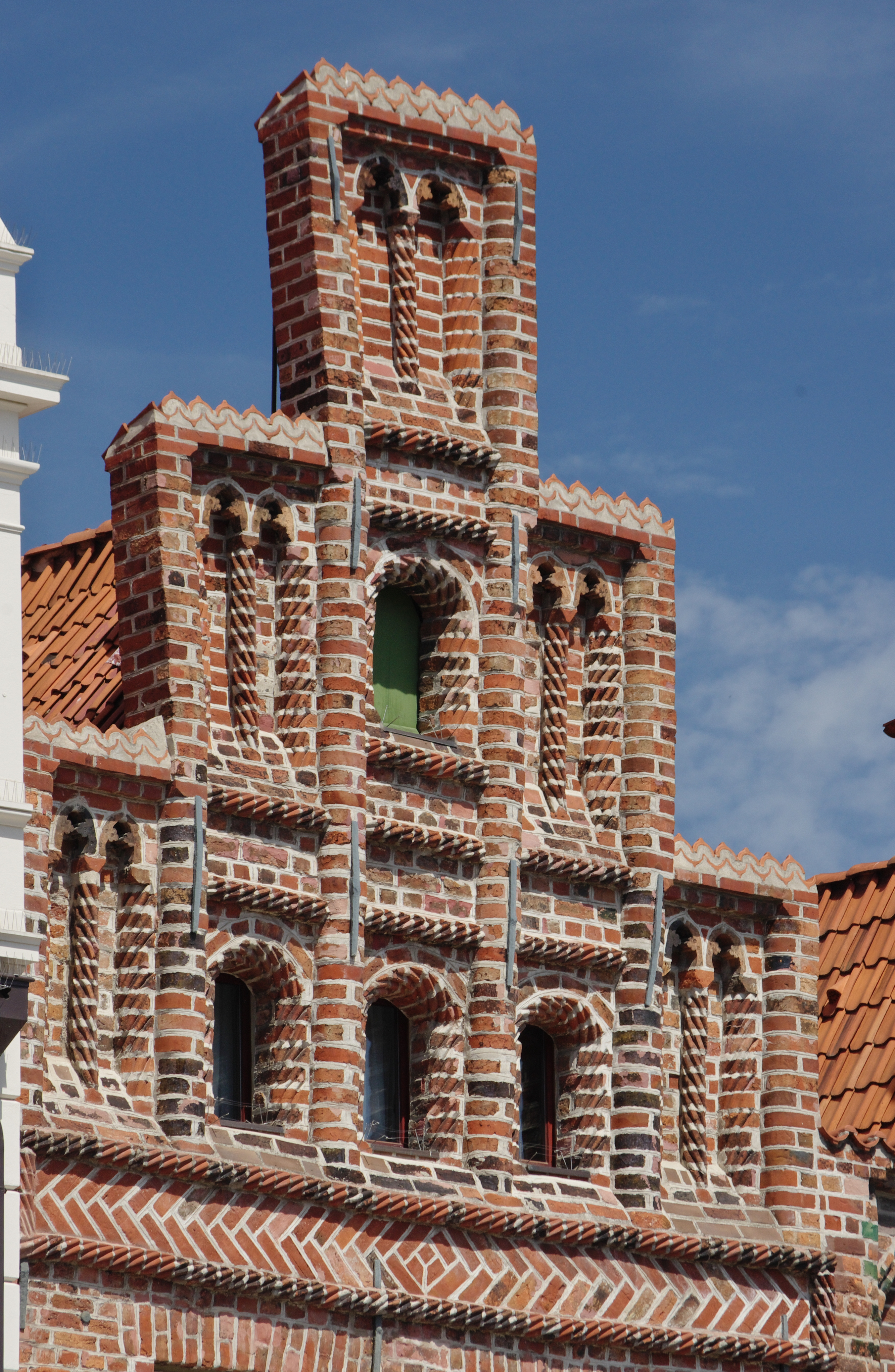 Lüneburg, Skillshare 2010, Stadtrundgang, Am Sande, Giebel